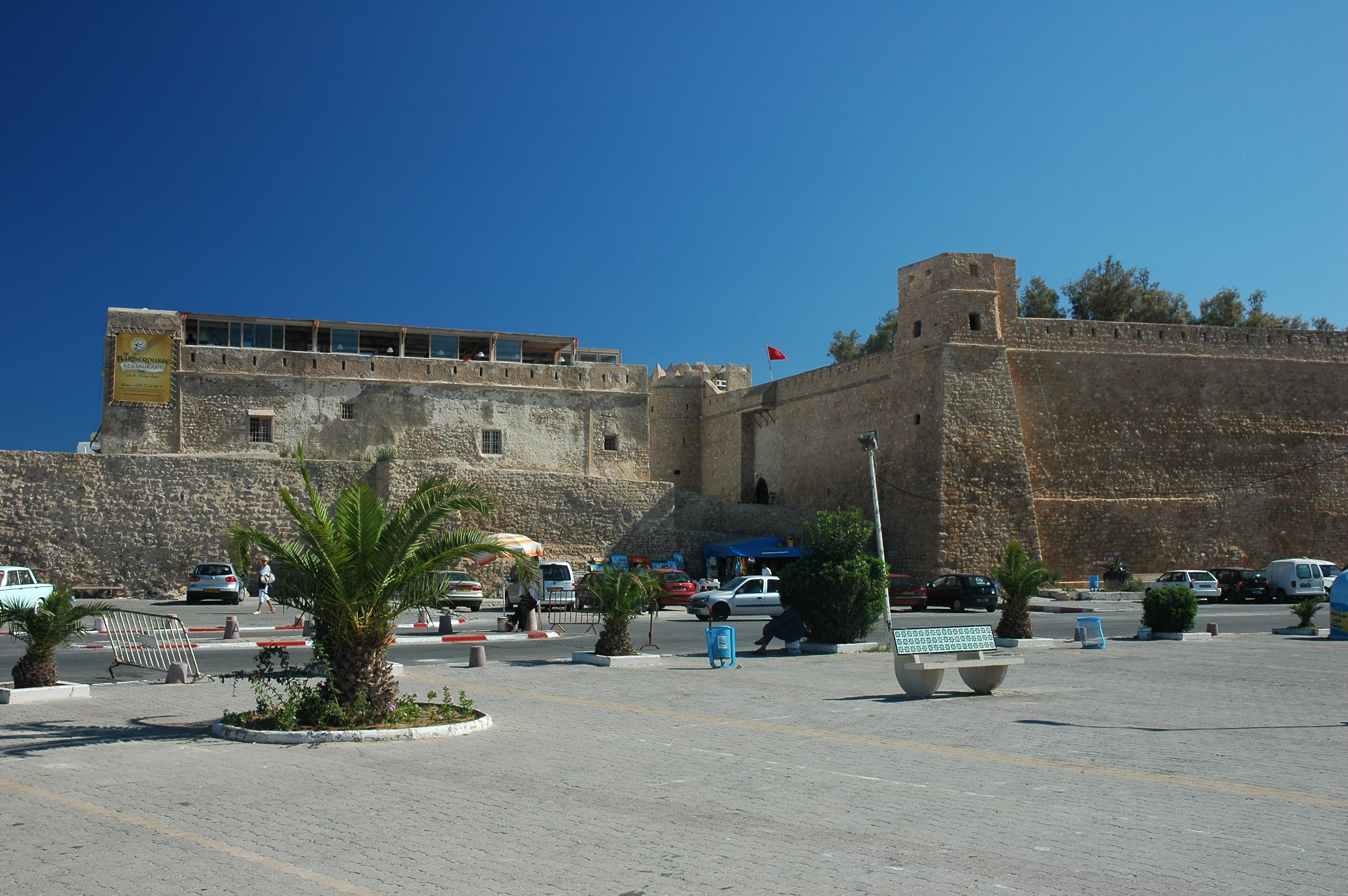 Tunisie Hammamet Médina Photographie prise par Patrick GIRAUD